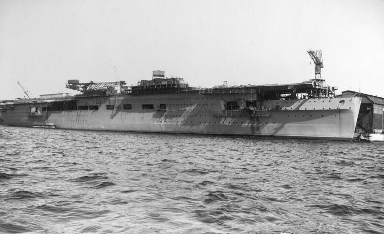 Flugzeugträger "Graf Zeppelin". Baustadium Aufgen. am 20.6.1939 Deutsche Werke Kiel